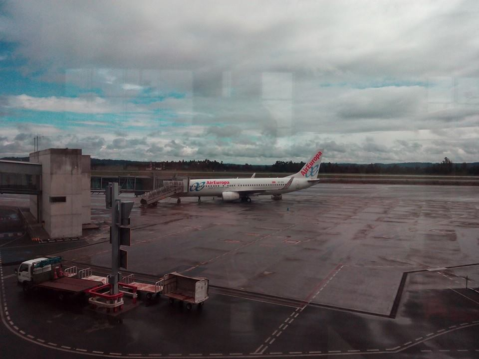 Boeing 737 de Air Europa estacionado en el aeropuerto de Santiago de Compostela